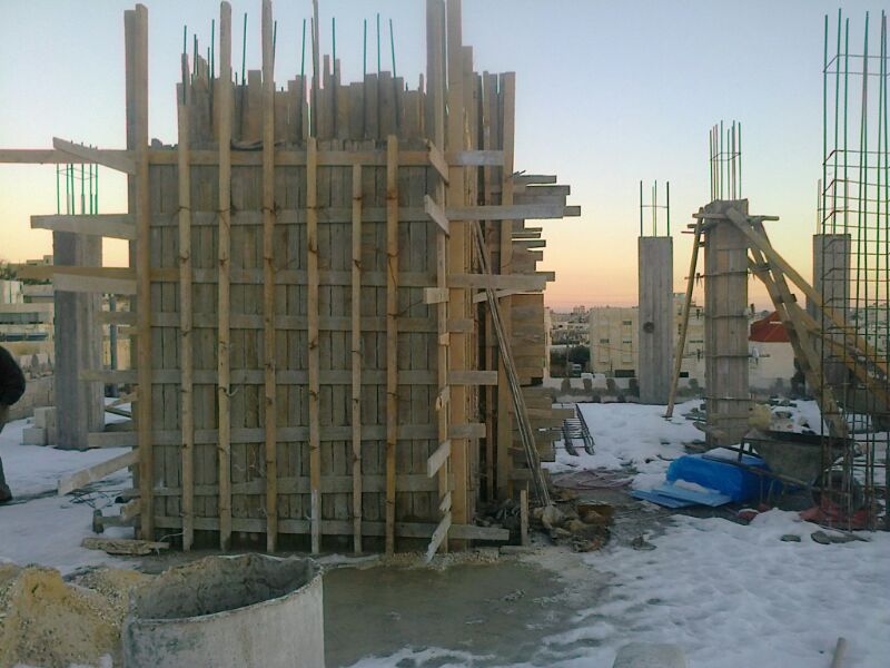 طوبار 8